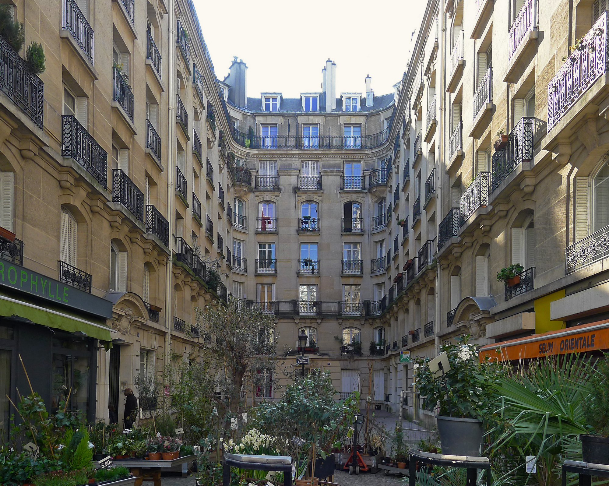 Villa Ornano - Paris XVIII